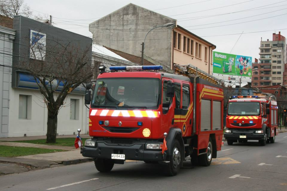 Camión de Bomberos del Cuerpo de Bomberos de San Pedro de la Paz